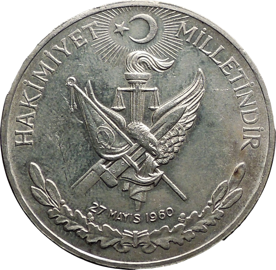 27 Mayıs Darbesi sonrası basılan Türkiye'nin ilk hatıra parası.